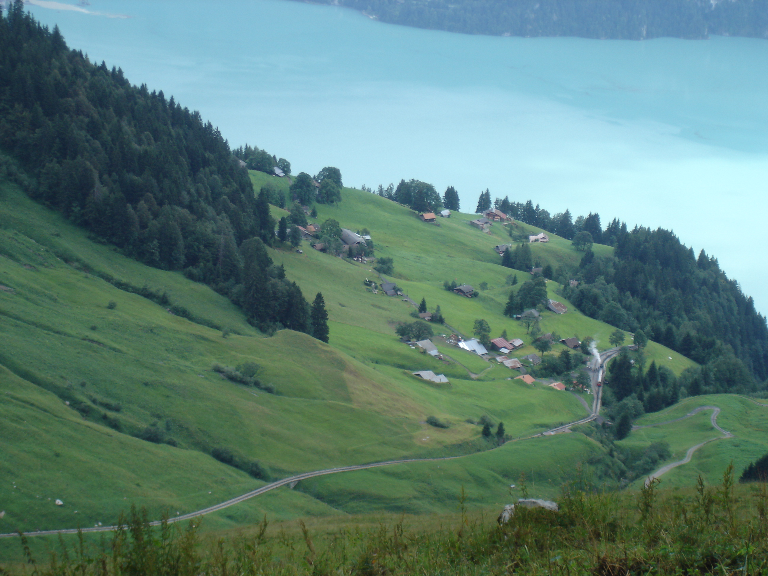 Planalp oberhalb Brienz BE von Tanngrindel aus fotografiert